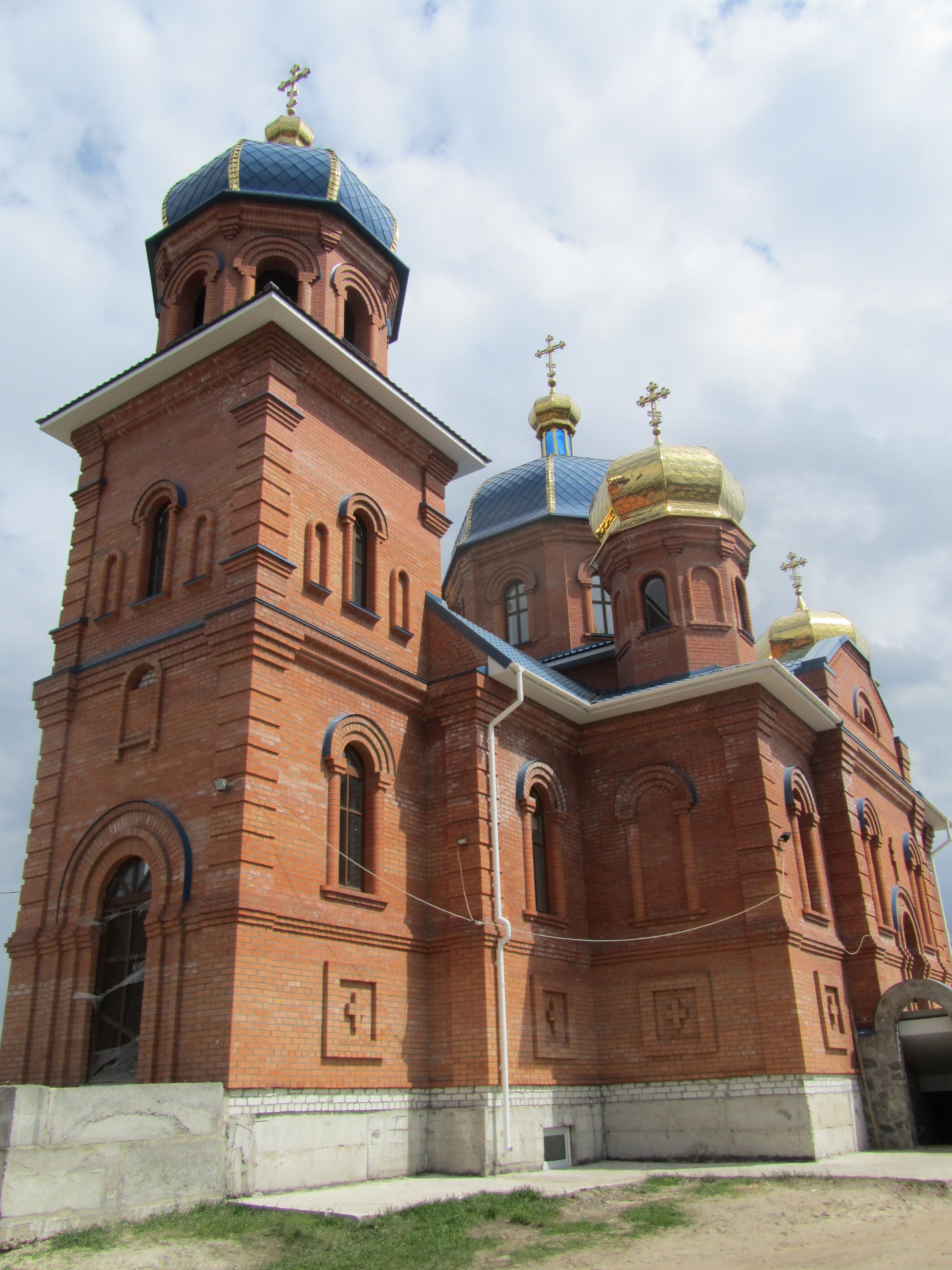 Храм у селі Піщане Кременчуцького району